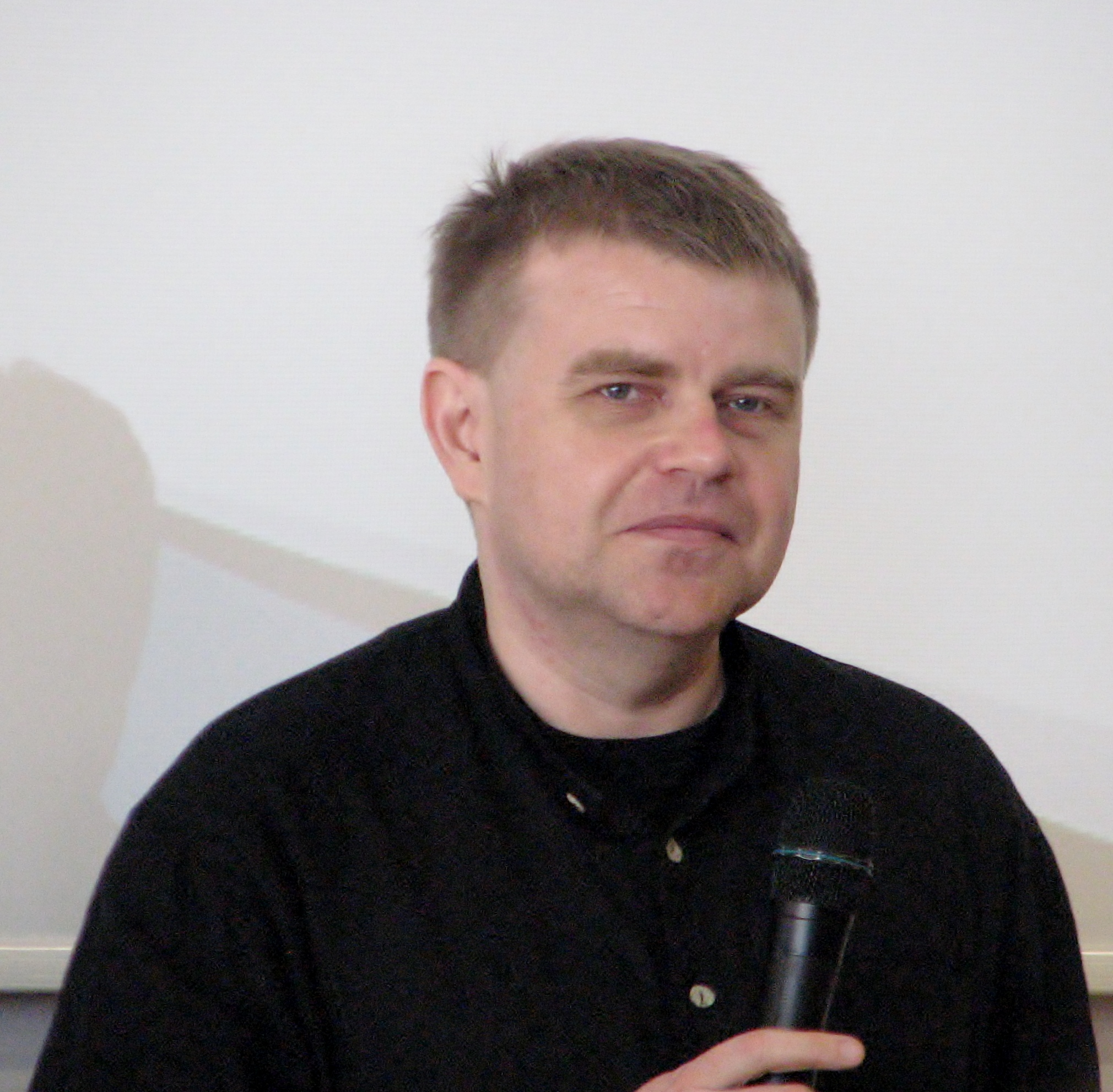 Andrus Kivirähk Tallinna päeval dikteerimas etteütlust